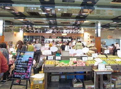 愛和館２